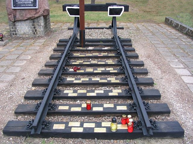 Pomnik w Otłoczynie po renowacji w 2003 roku